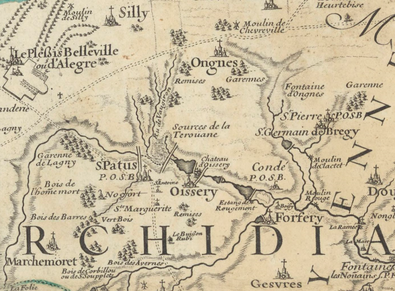 Oissery et ses environs, seigneurie des Barres.